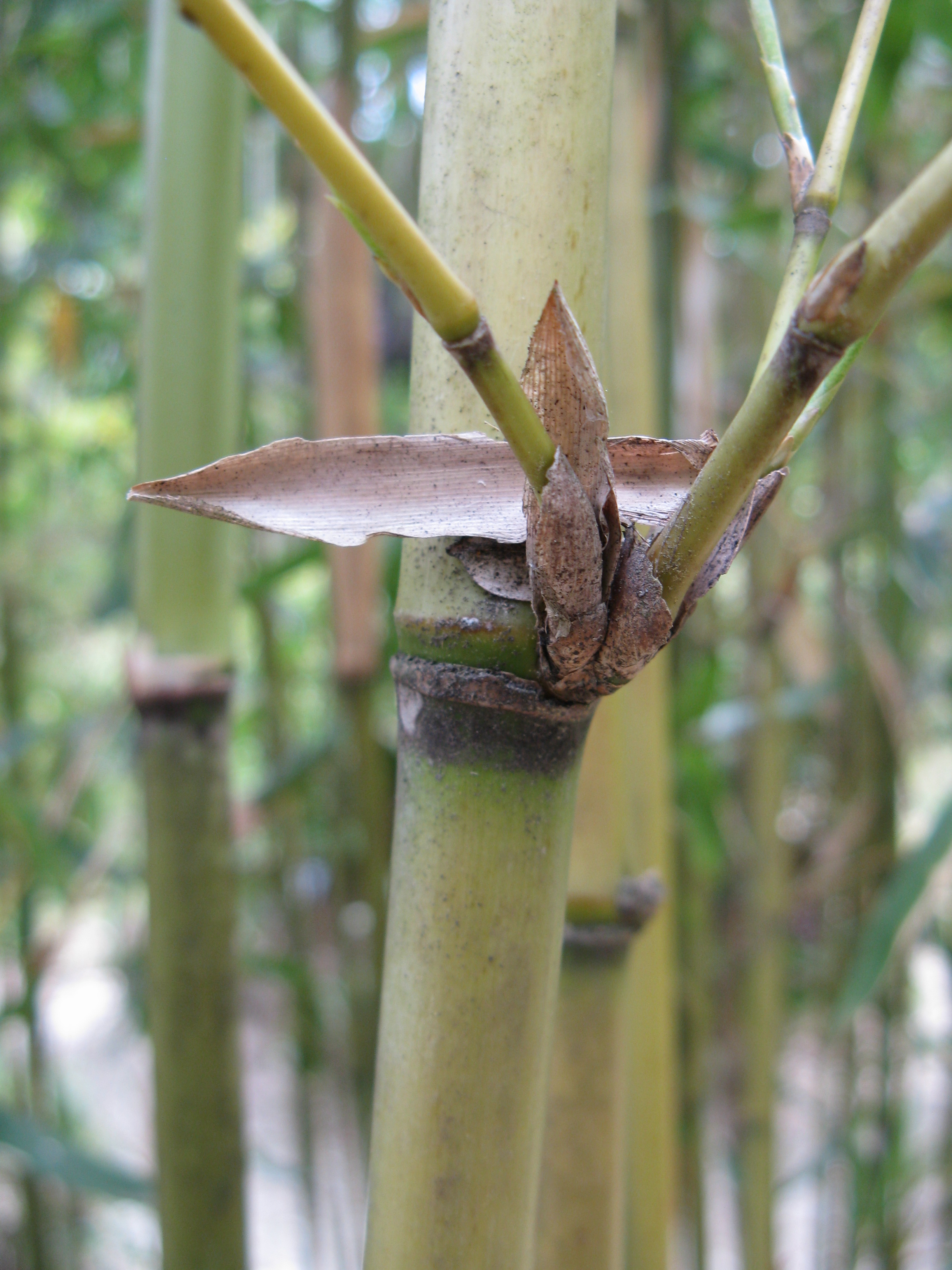 Scientific name Semiarundinaria yashadake